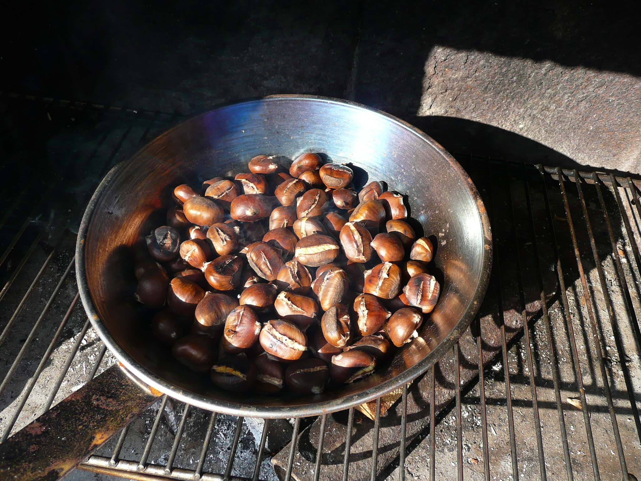 see title